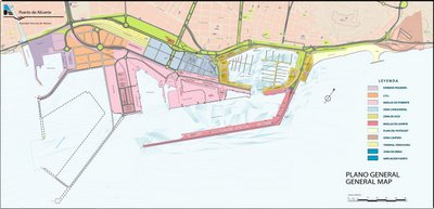 ampliacion del plano de puerto